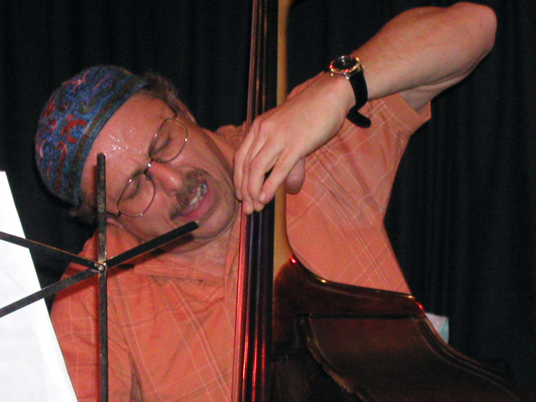 Joe Fonda mit der "Nu Band" im Club W71 in Weikersheim